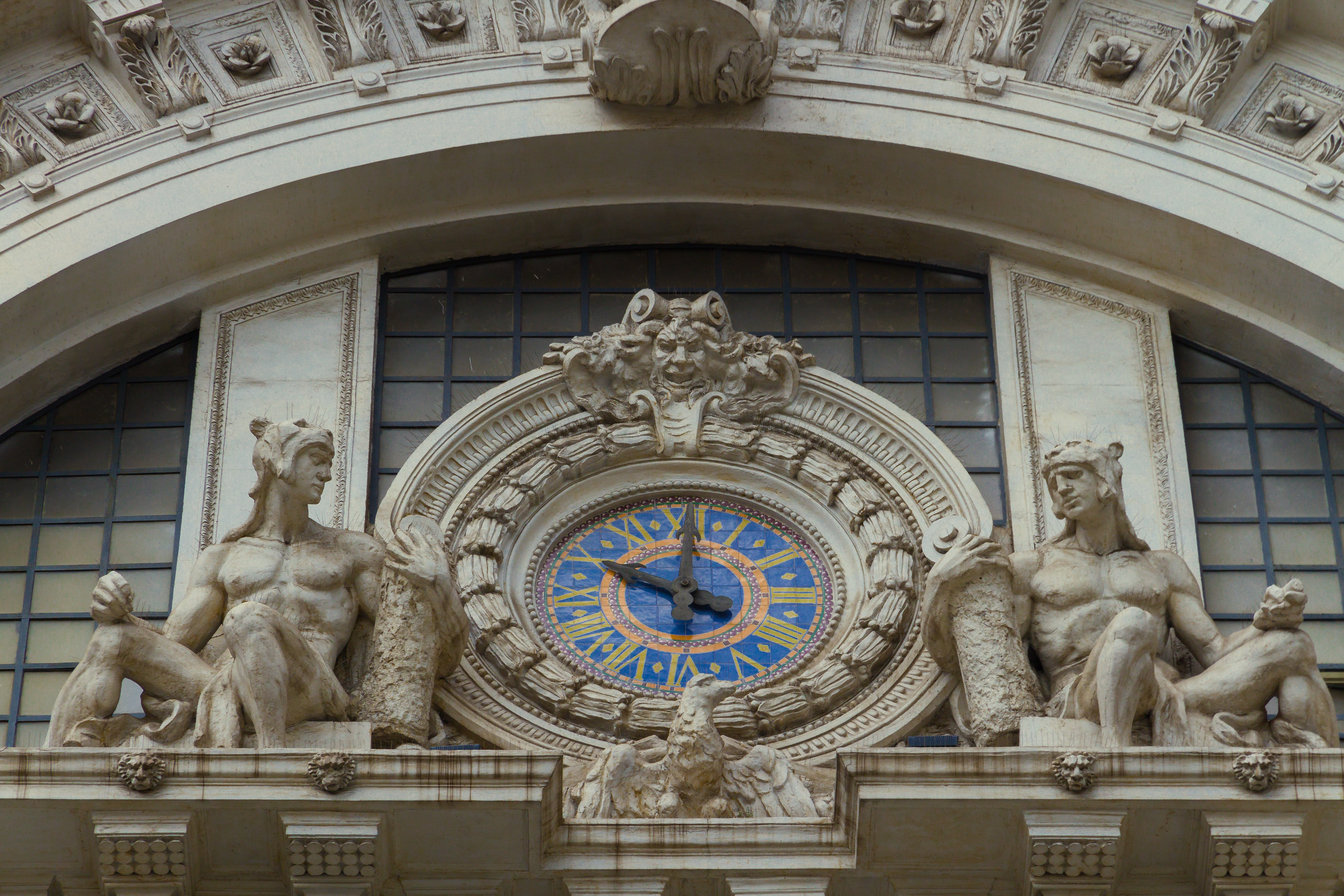 Napoli Mergellina train station